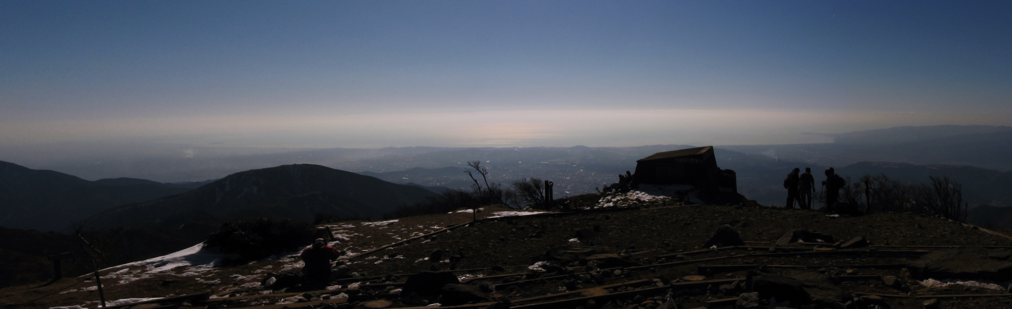 塔ノ岳から見た相模湾